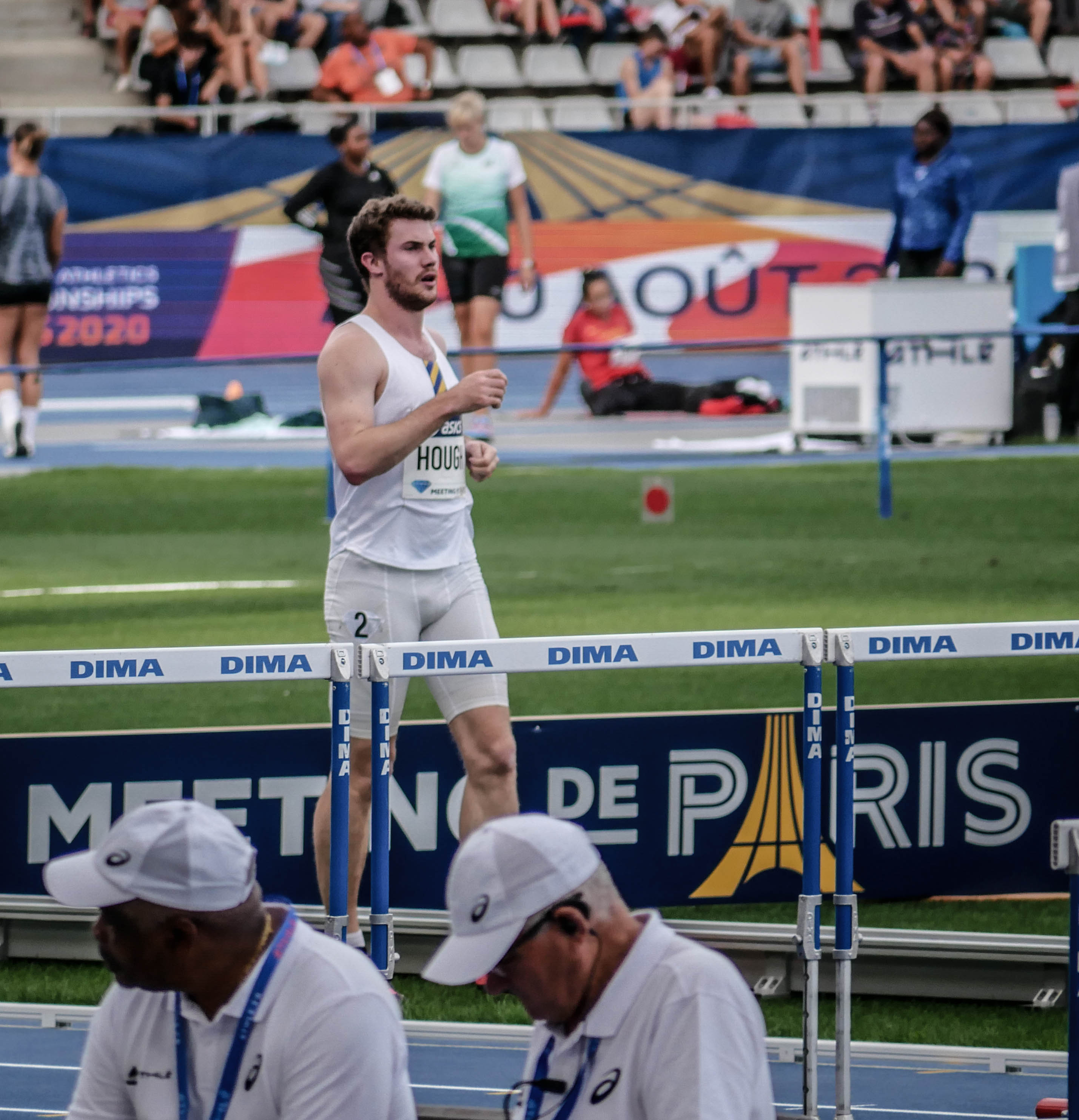 Meeting de Paris 2019 - Compétition d'athlétisme au stade Charlety - 24 août 2019